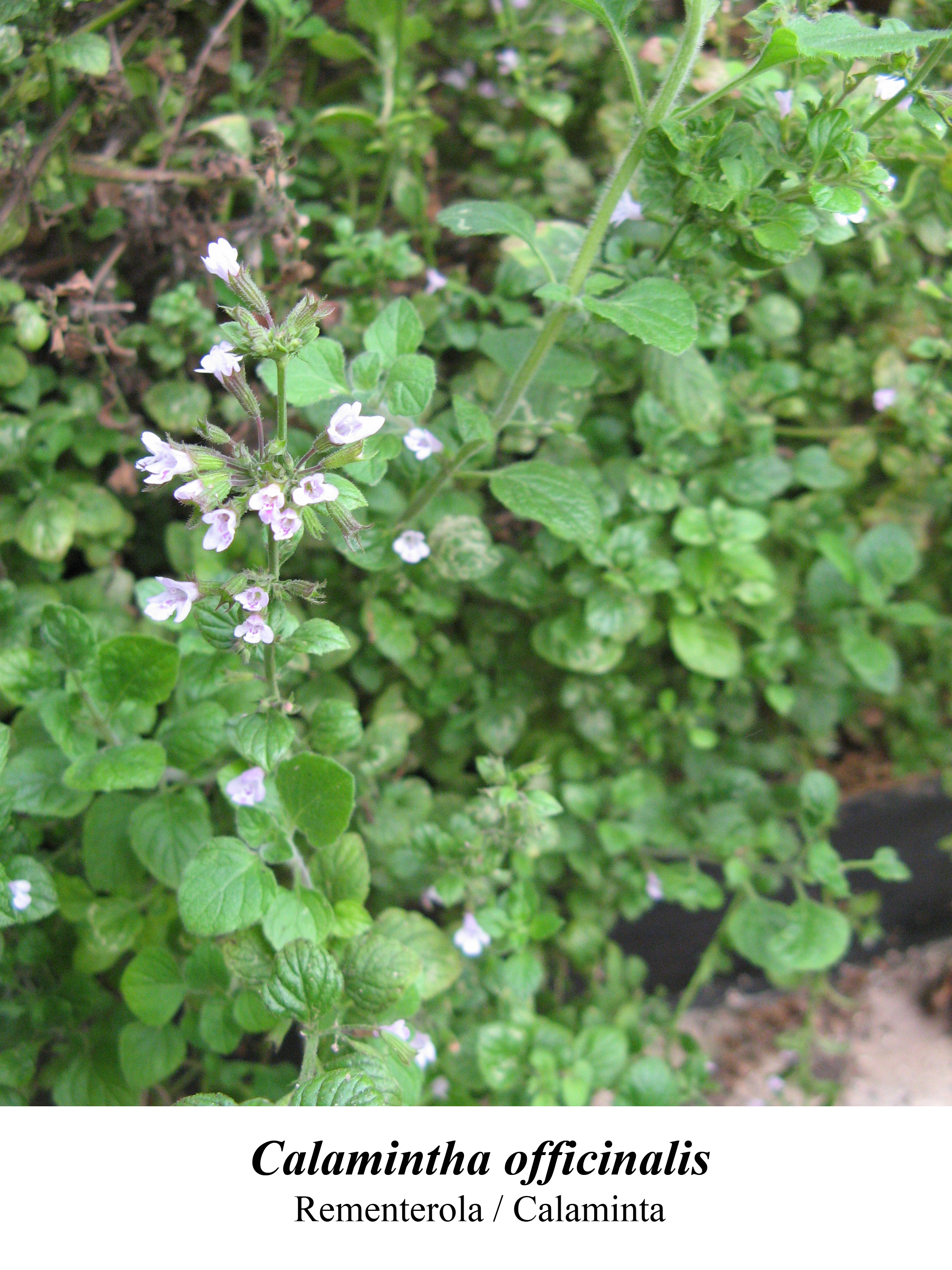 planta medicinal